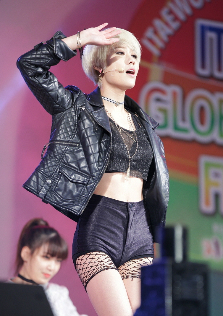 스테파니(Stephanie) OBS 지구촌 행복 나눔 콘서트